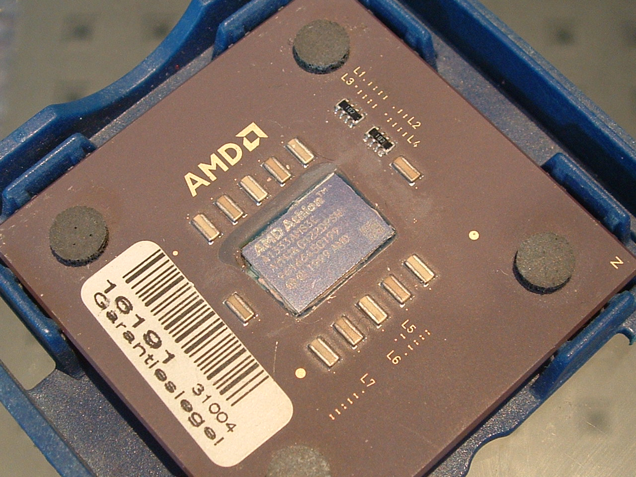 AMD Athlon Thunderbird mit 1.333 MHz; A1333AMS3C.